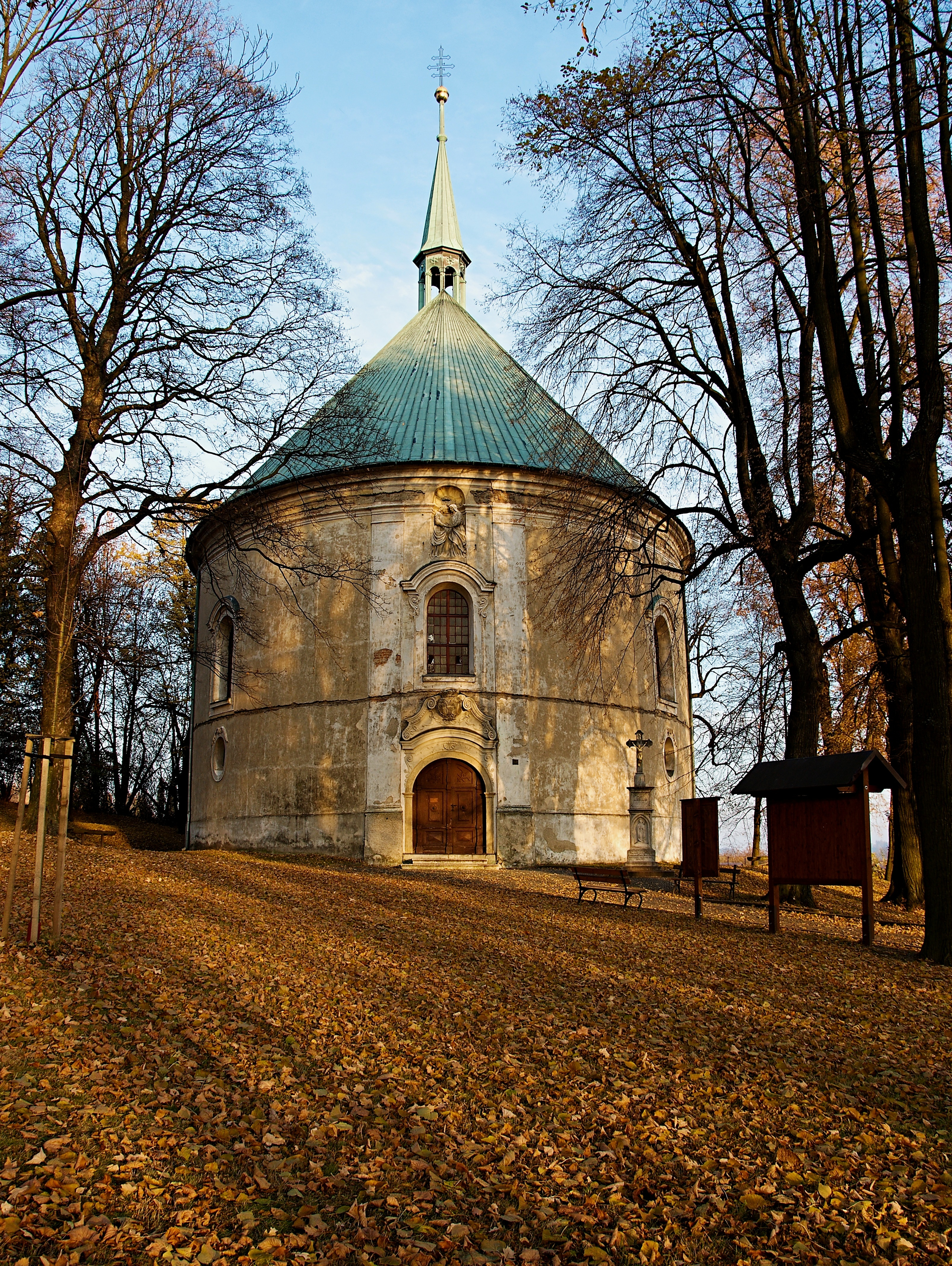 Kaple Navštívení Panny Marie, tzv. kaple v lipkách v Rýmařově